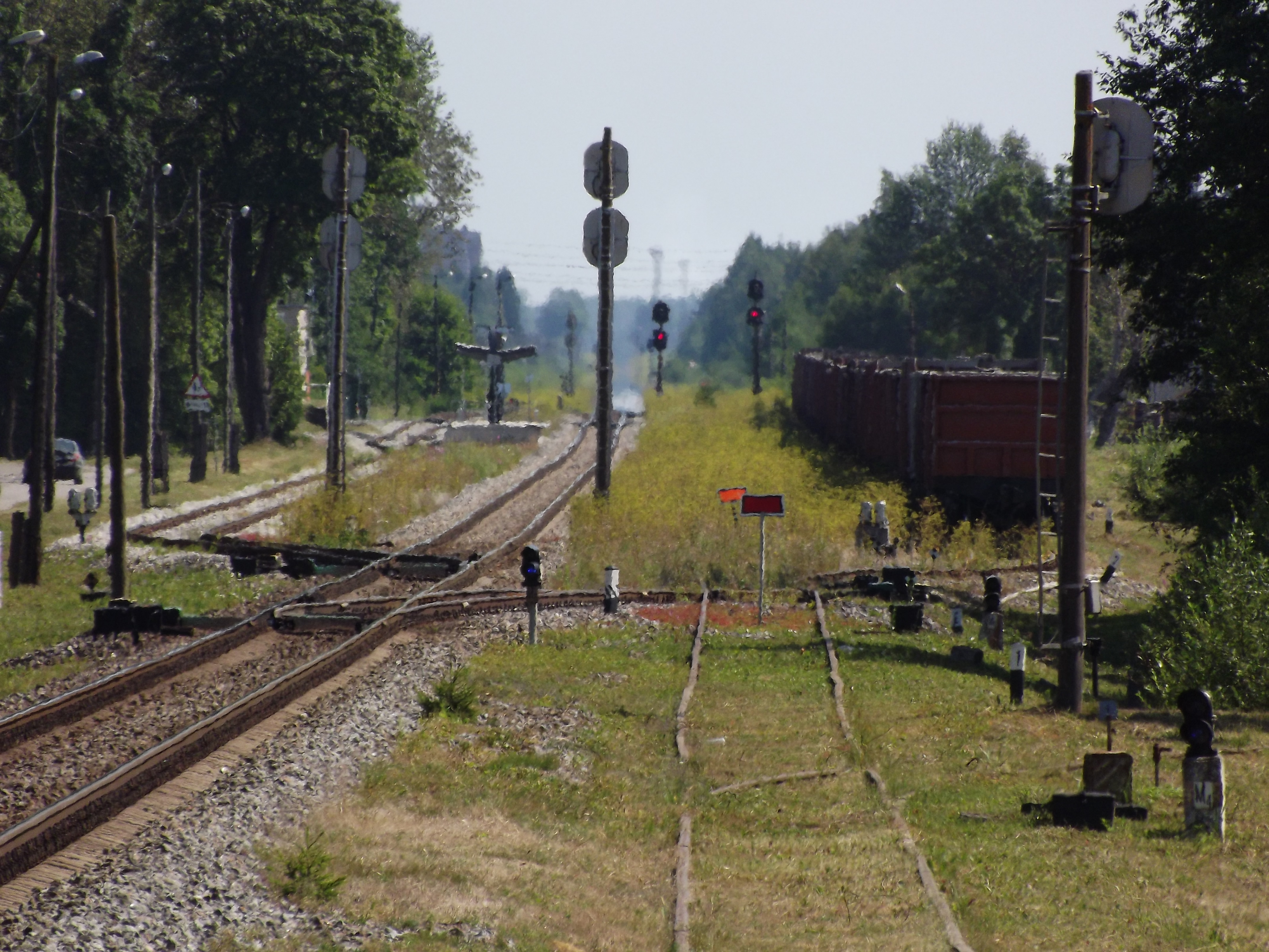 Sonda raudteejaam vaatega Tallinna poolt.